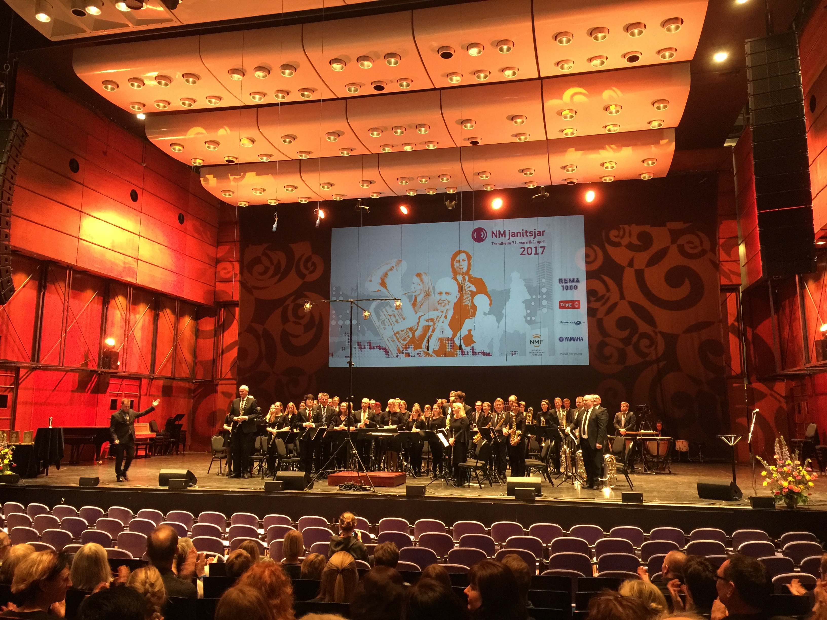 Vestre Aker Musikkorps - NM janitsjar 2017